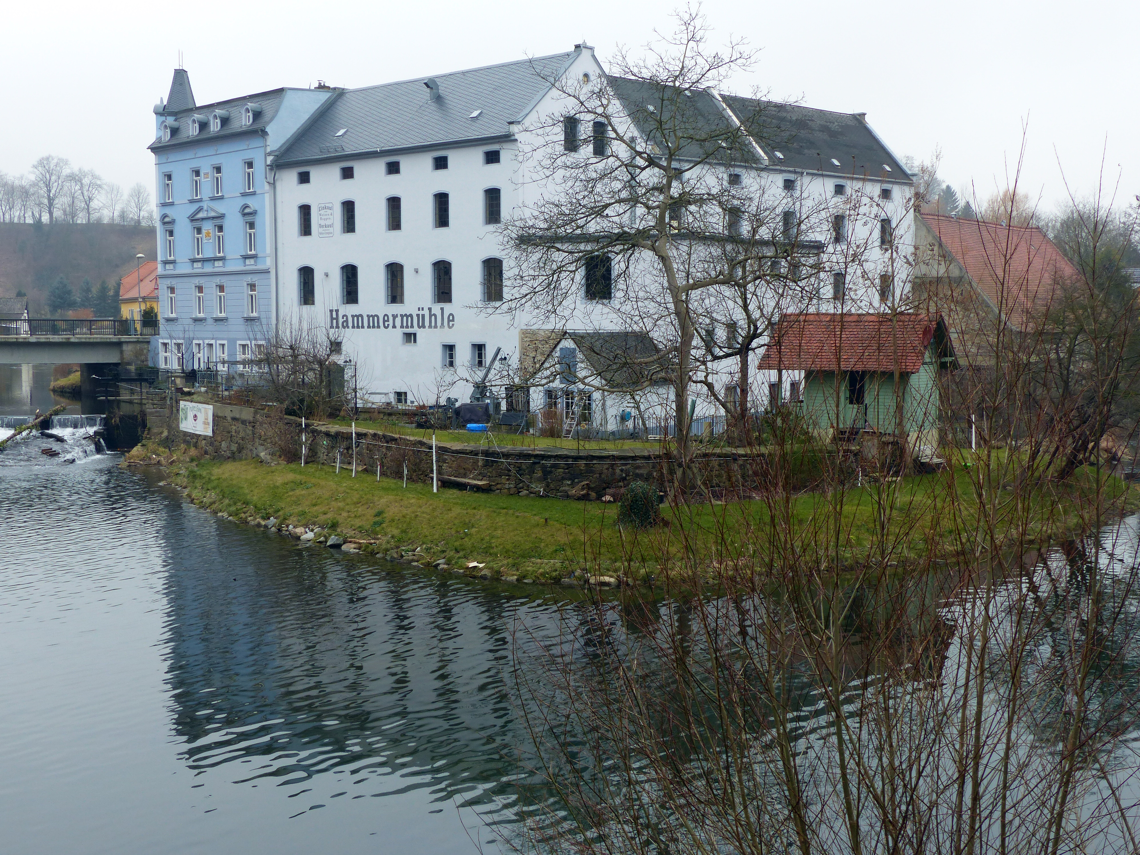 Hammermühle-Eisenhammer, Seidauer Straße 2; 4, Bautzen